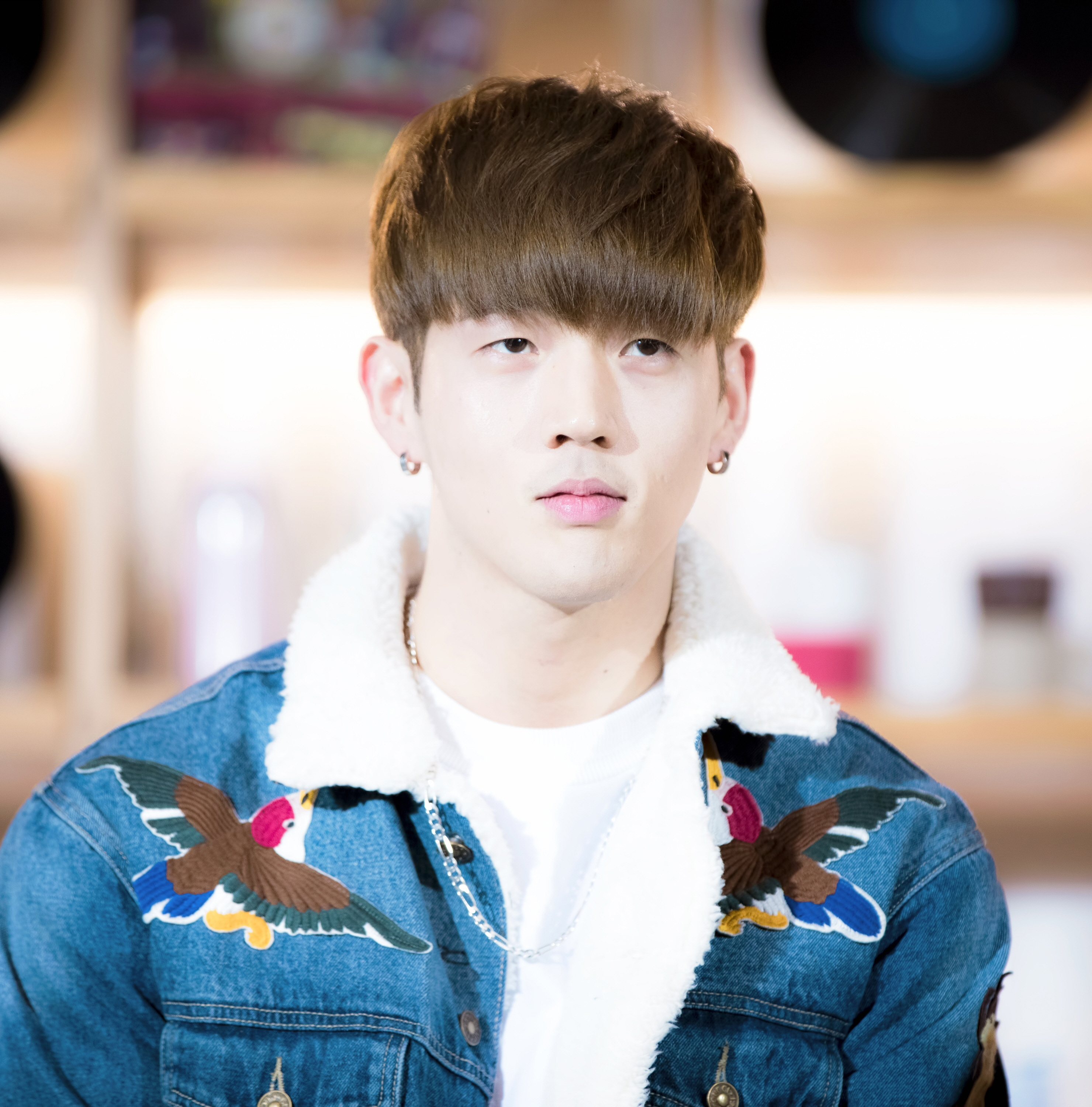 161217 상암 SOUND-K 달콤콘서트 비엠 5Pic